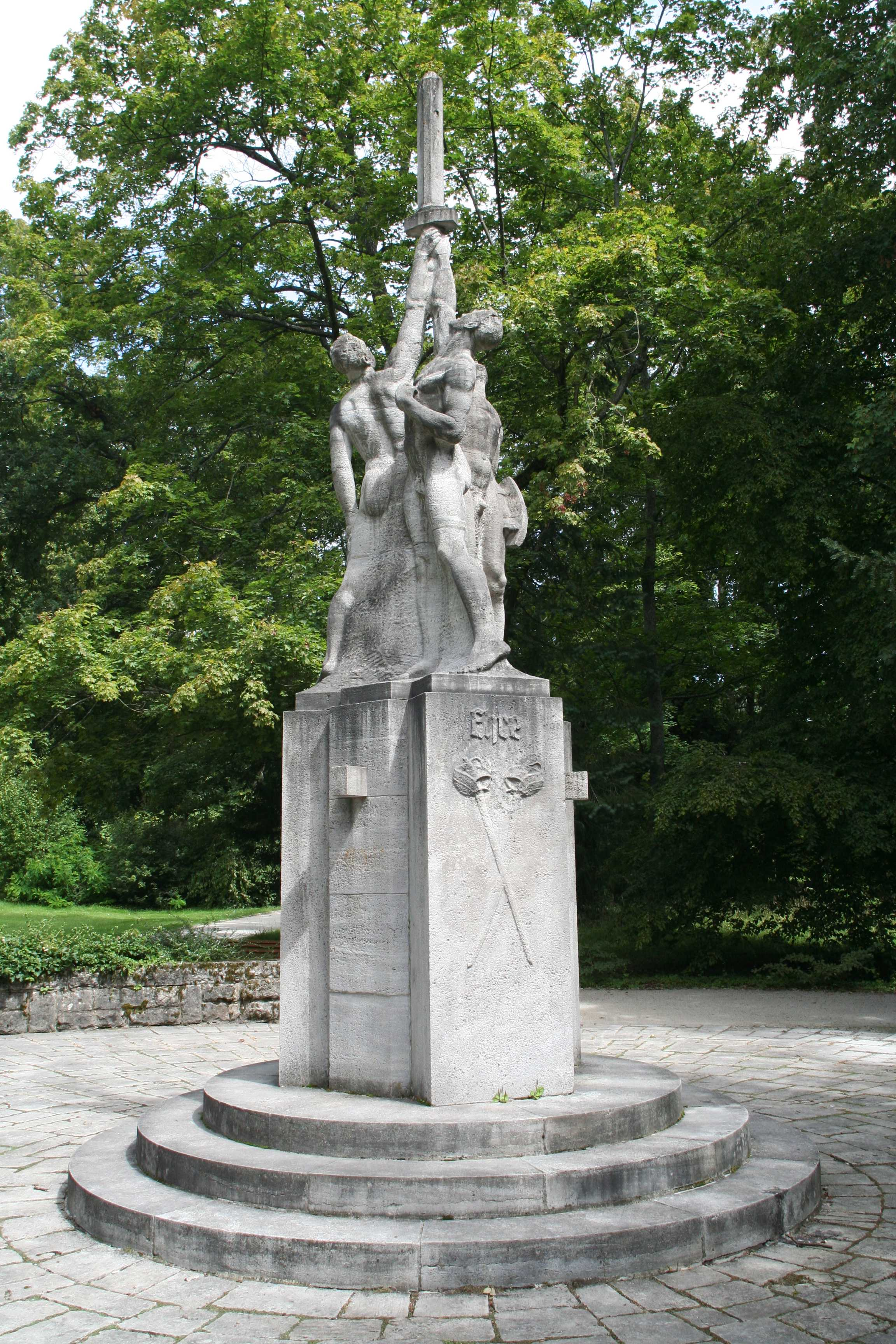 Kriegerdenkmal im Coburger Hofgarten (Ehrenmal des Coburger Convents der Lands- und Turnerschaften (studentenverbindungen))